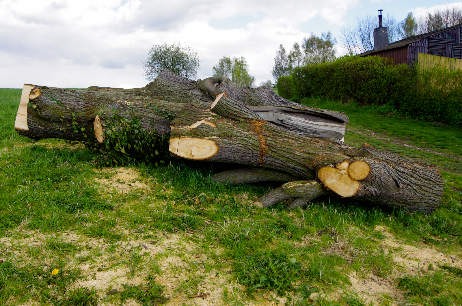 Lípa u Kopeckých, bývalý památný strom v Těšovicích, okres Sokolov, (právní ochrana stromu byla zrušena v říjnu 2013 z důvodu výrazného zhoršení zdravotního stavu, strom pokácen v dubnu 2014)